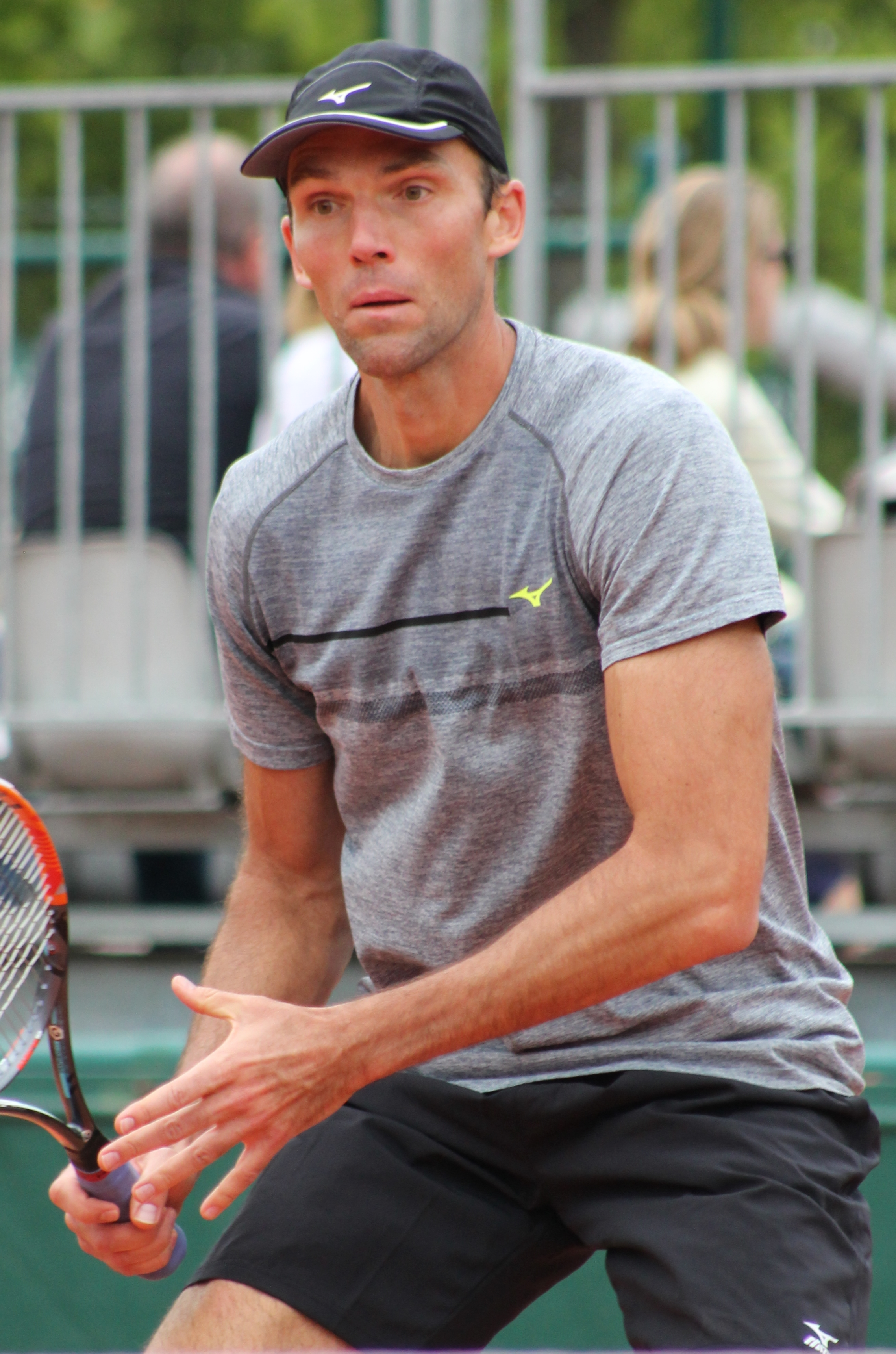 Karlovic RG16 (4)